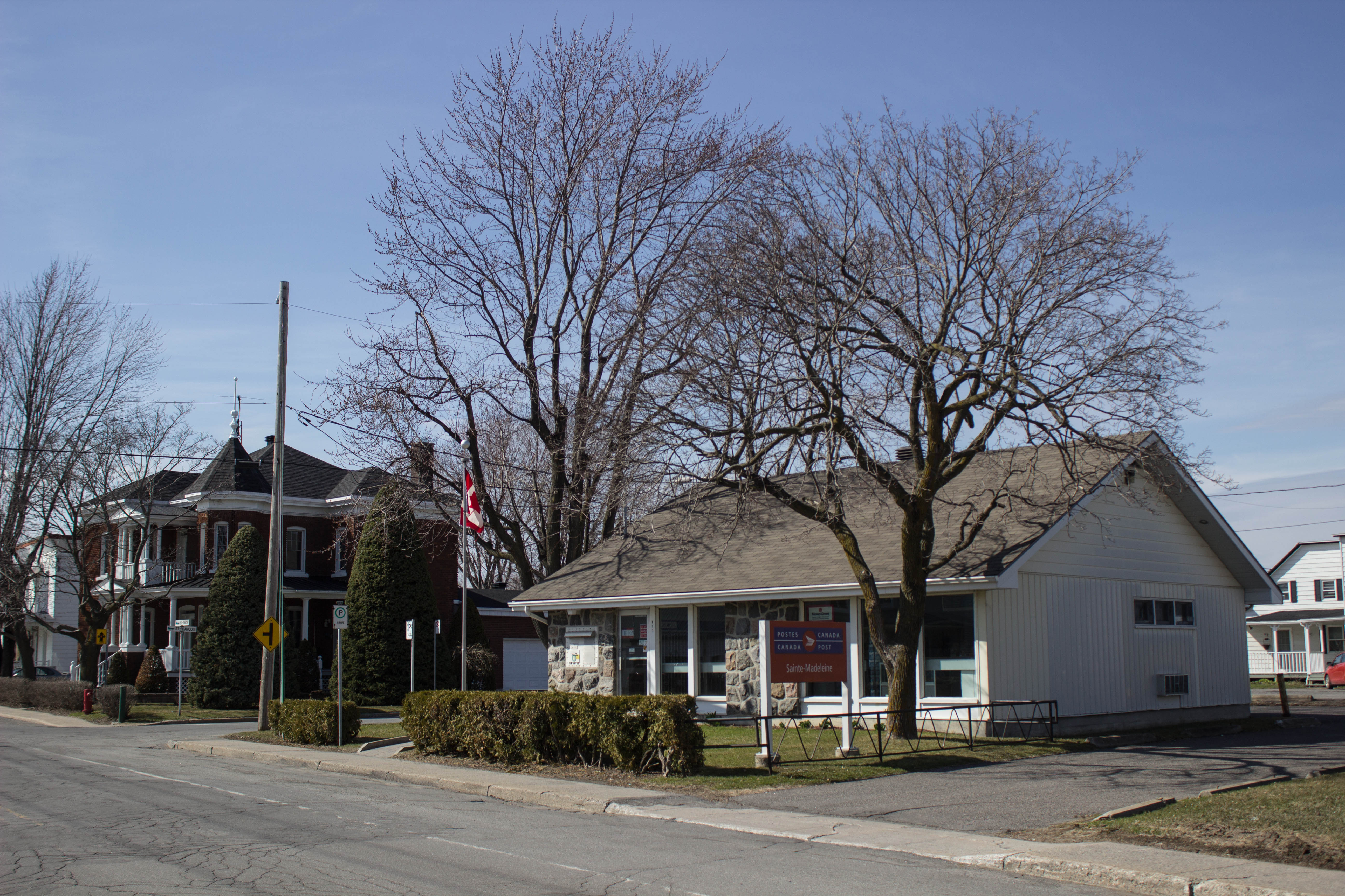 Bureau de poste et rue St-Simon à Sainte-Madeleine (Québec)